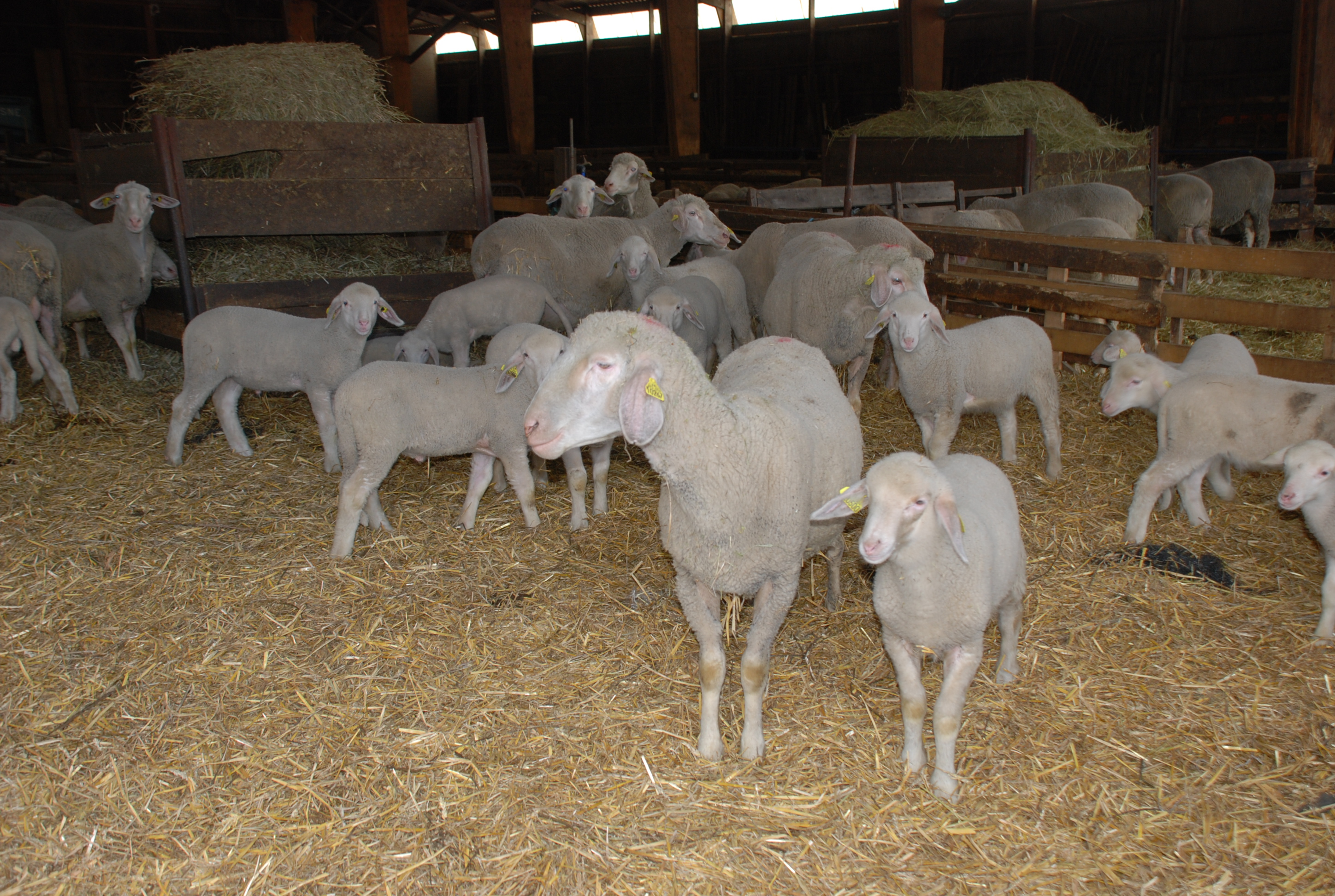 Brebis et agneaux Est à laine mérinos, élevage Simon, ferme du château, à Preny, (Meurthe et Moselle)